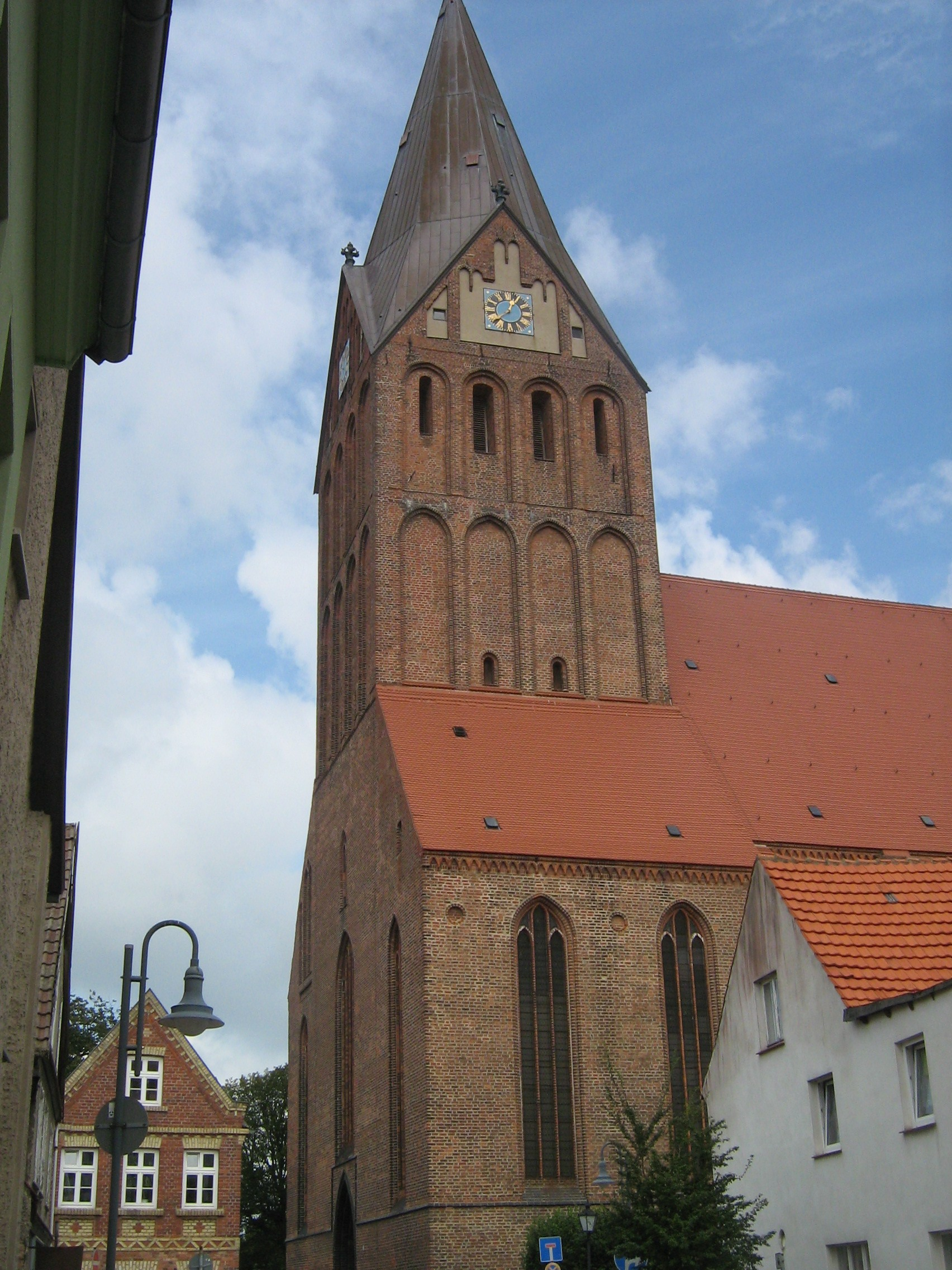 Stadtkirche in Barth